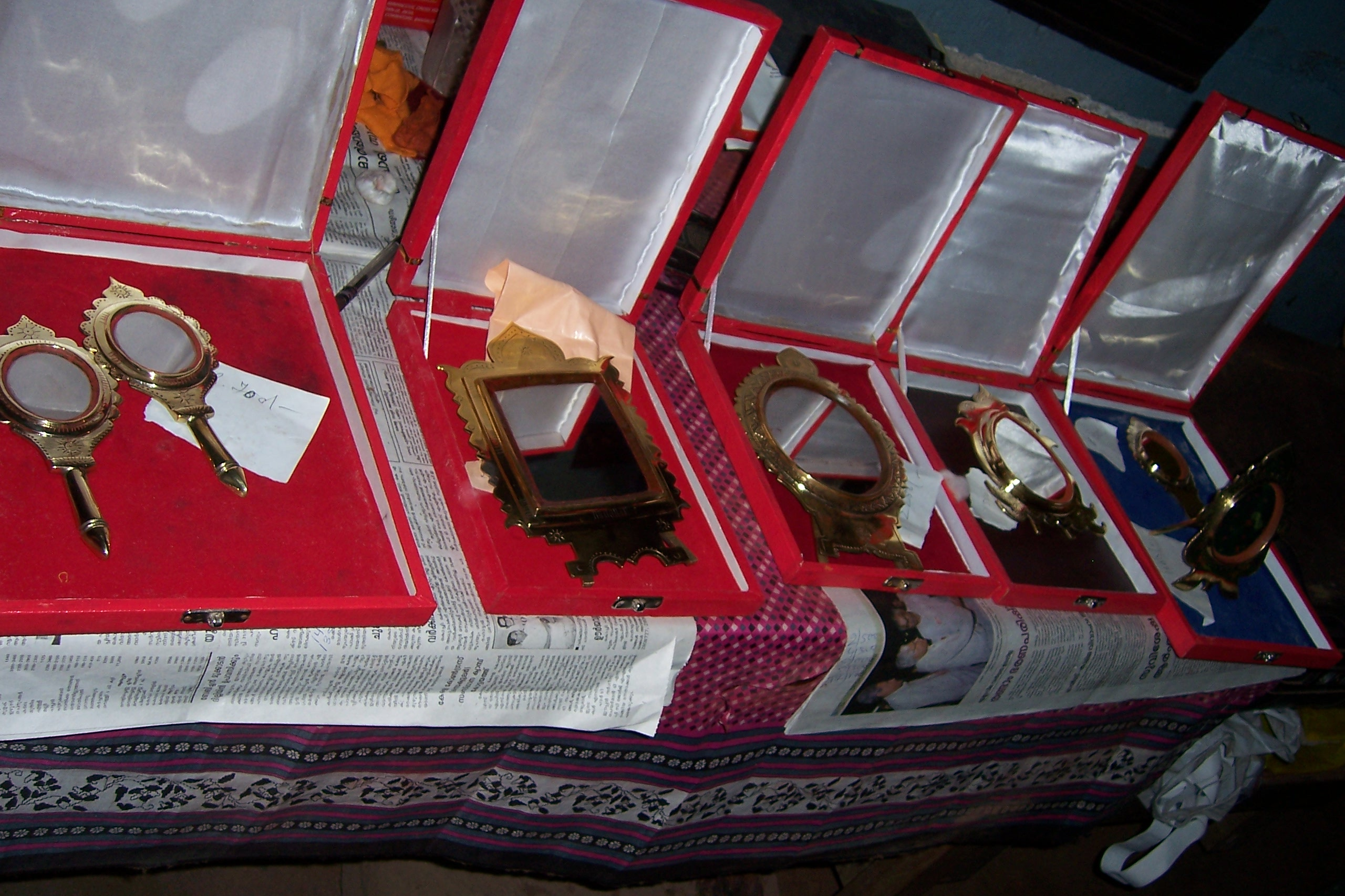 Metal Mirrors